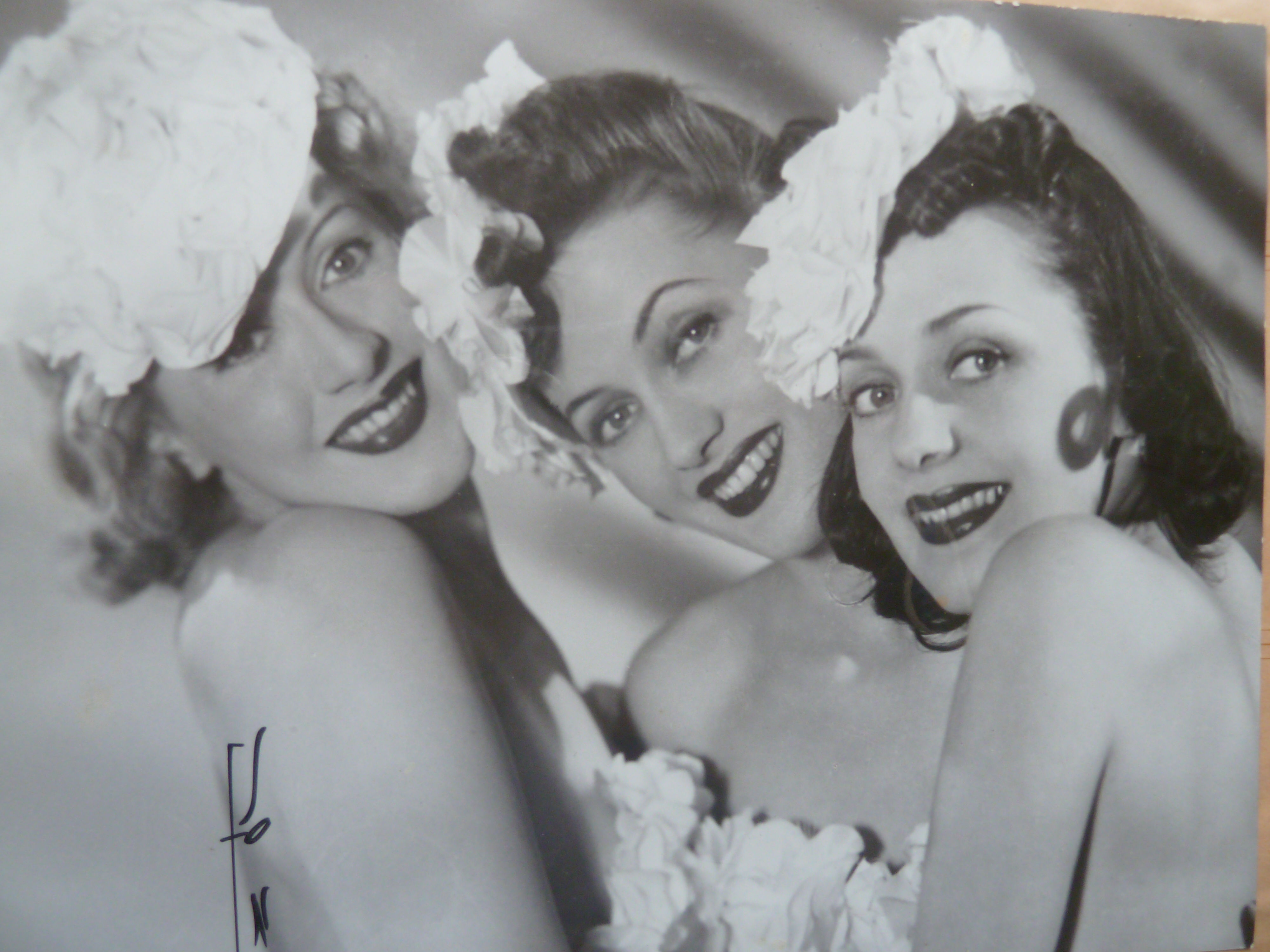 Marie-louis, Christina och Ulla Sorbon